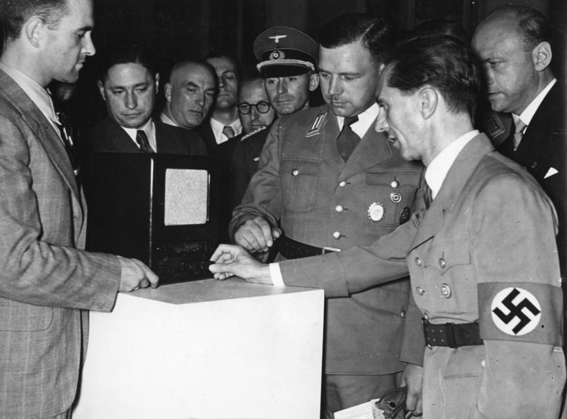 Reichsminister Goebbels auf der Funkausstellung Dr. Goebbels besichtigt den neuen Volksempfänger für RM 65,- , neben ihm rechts Präsident der Reichsrundfunkkammer Dr. Kriegler 5.8.38